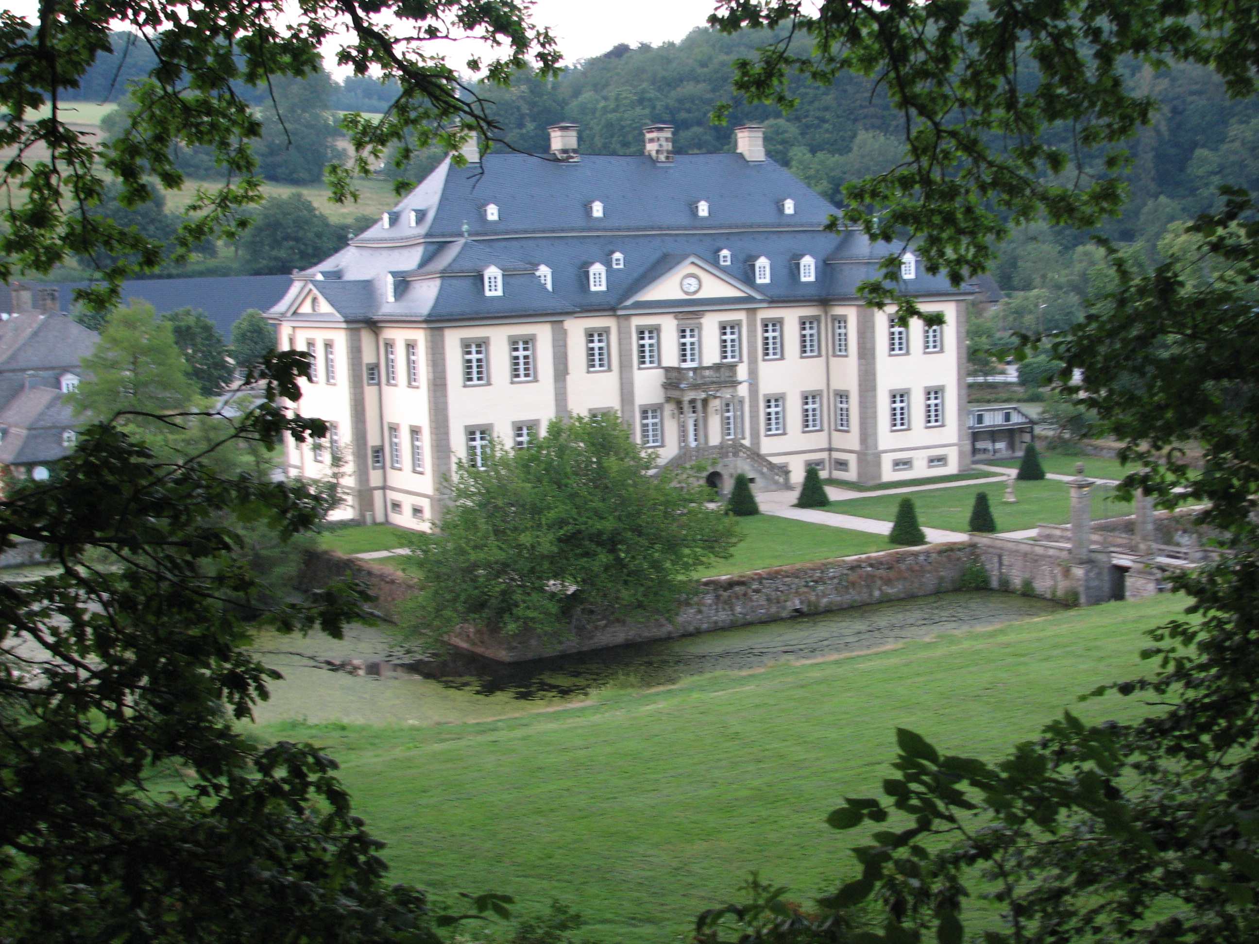 Schloss Körtlinghausen, Ruethen, Germany